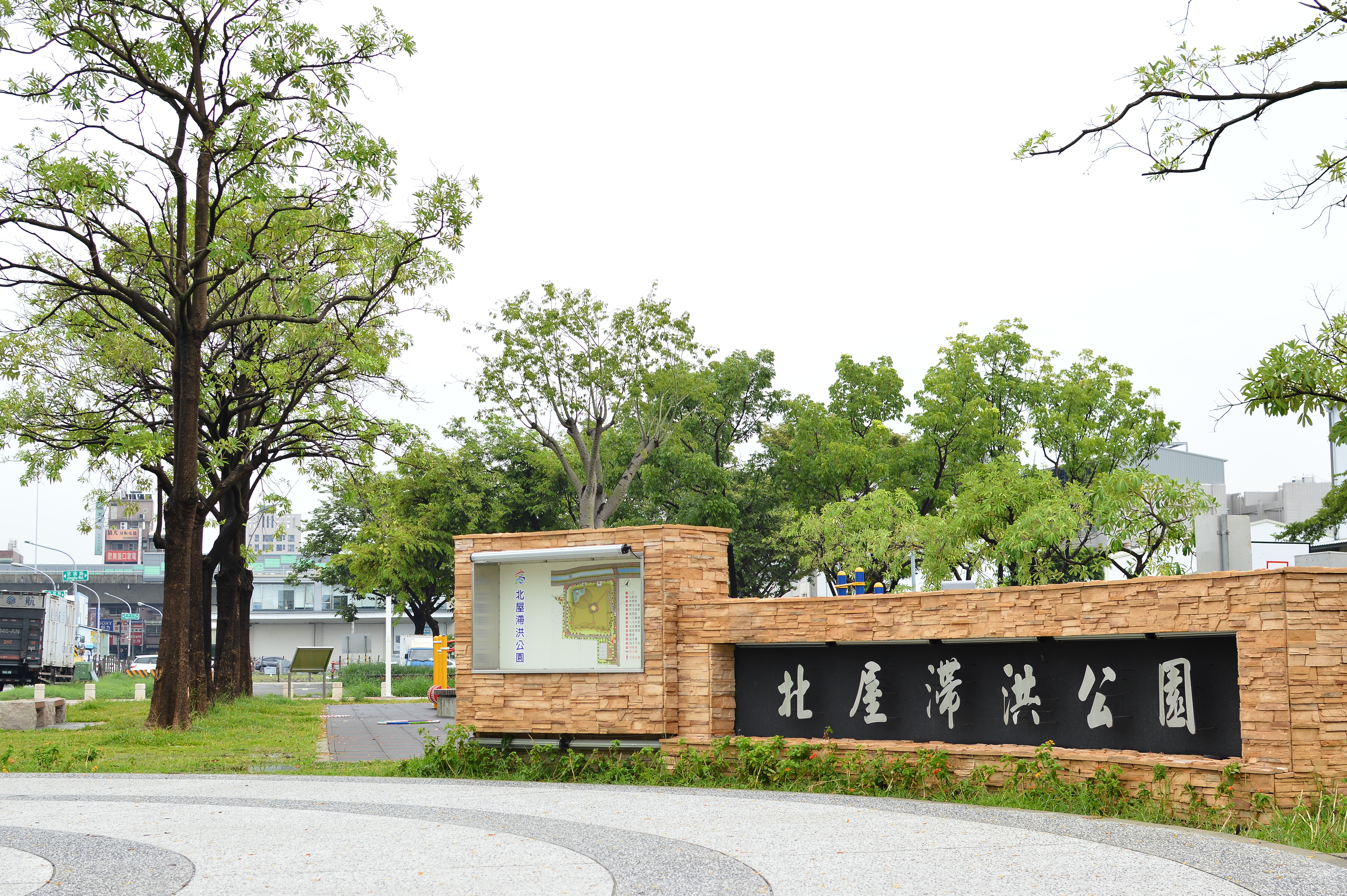 仁武區北屋滯洪公園2017